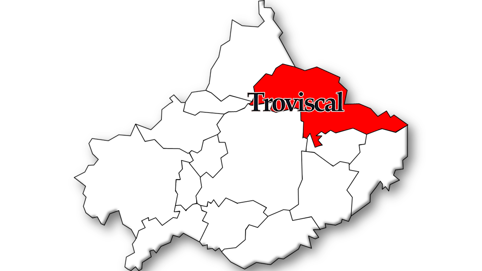 População